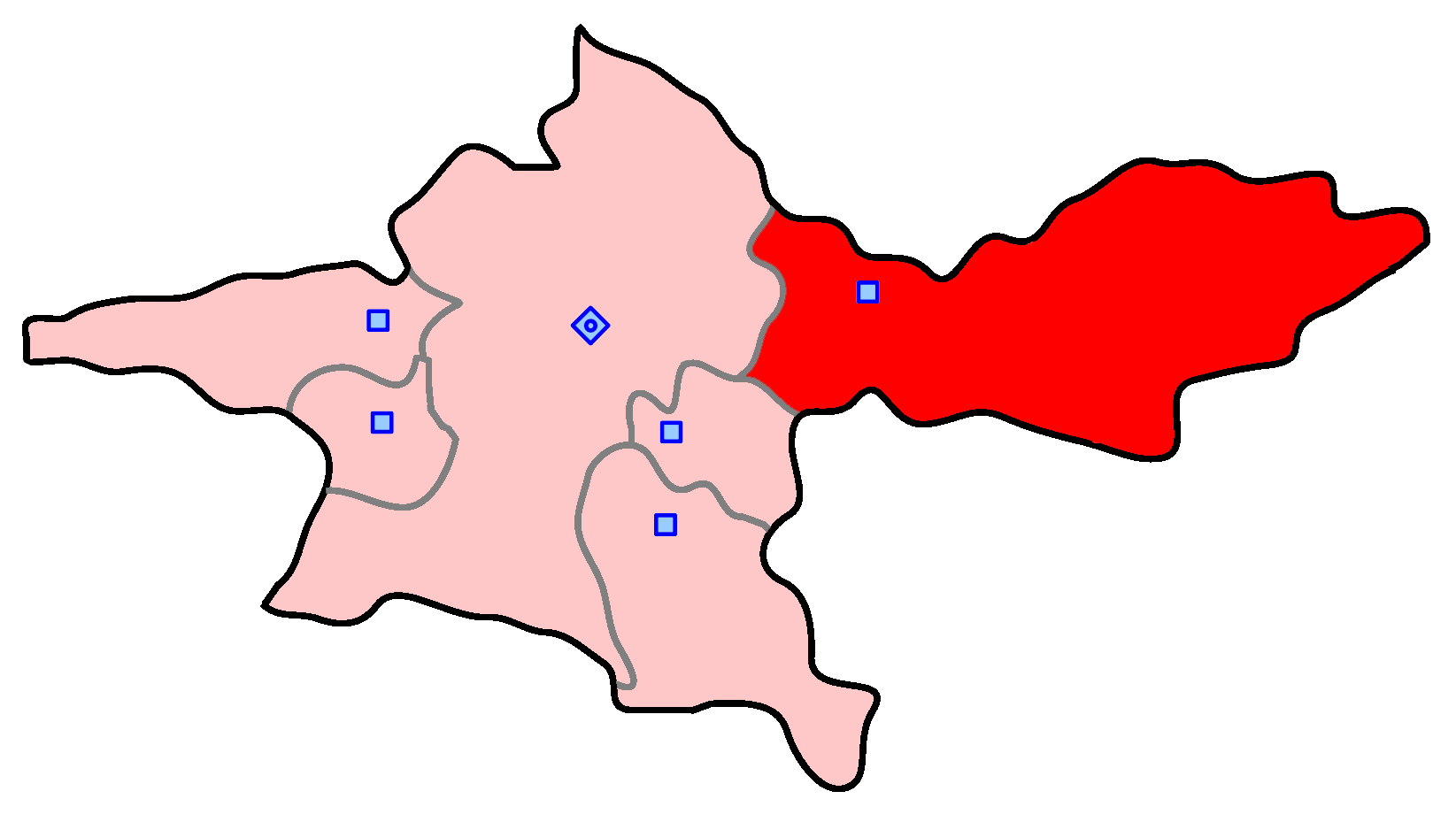 حوزهٔ انتخاباتی دماوند و ورامین برای انتخابات مجلس شورای اسلامی